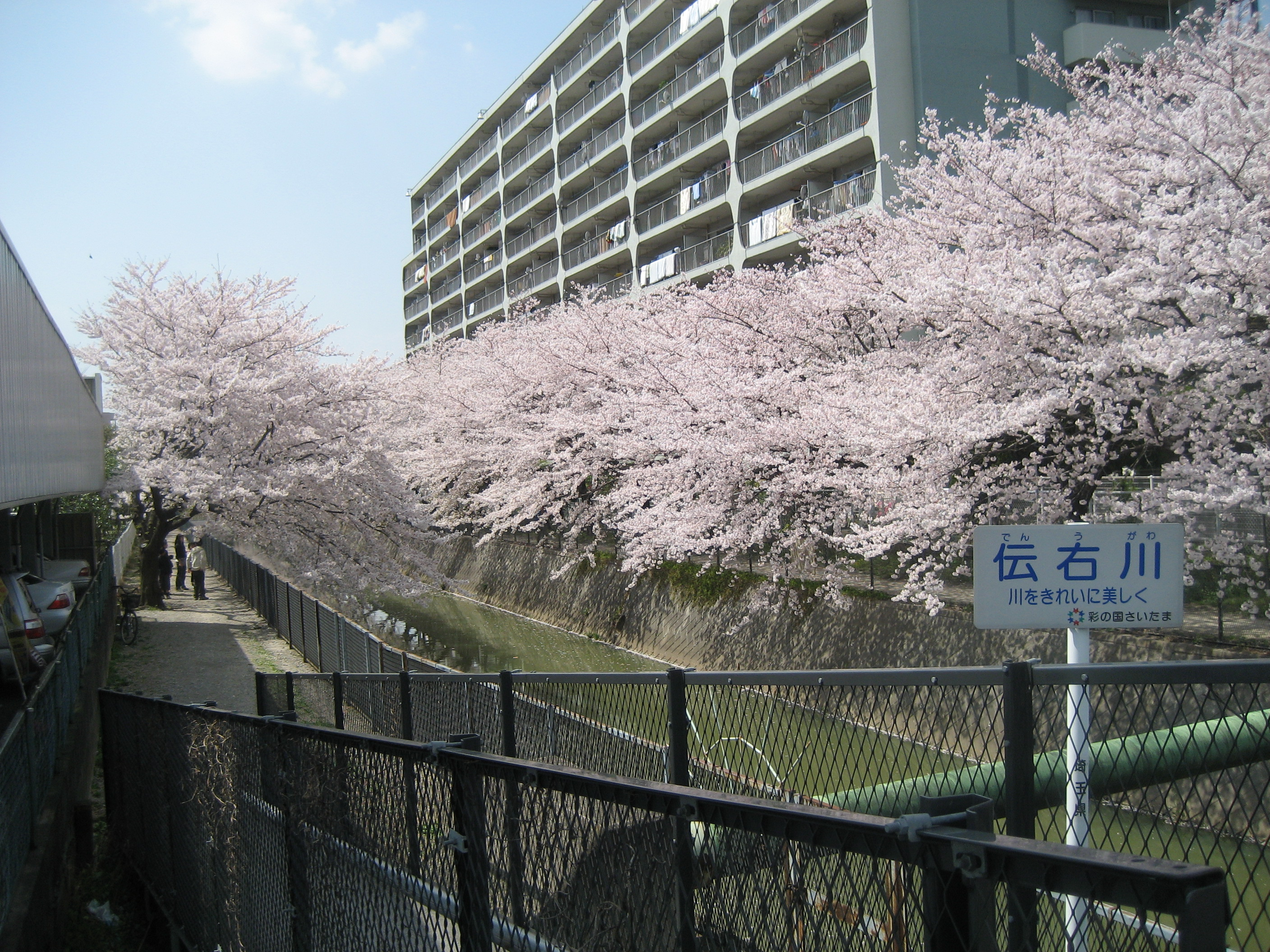 伝右川と満開の桜並木（草加市内）